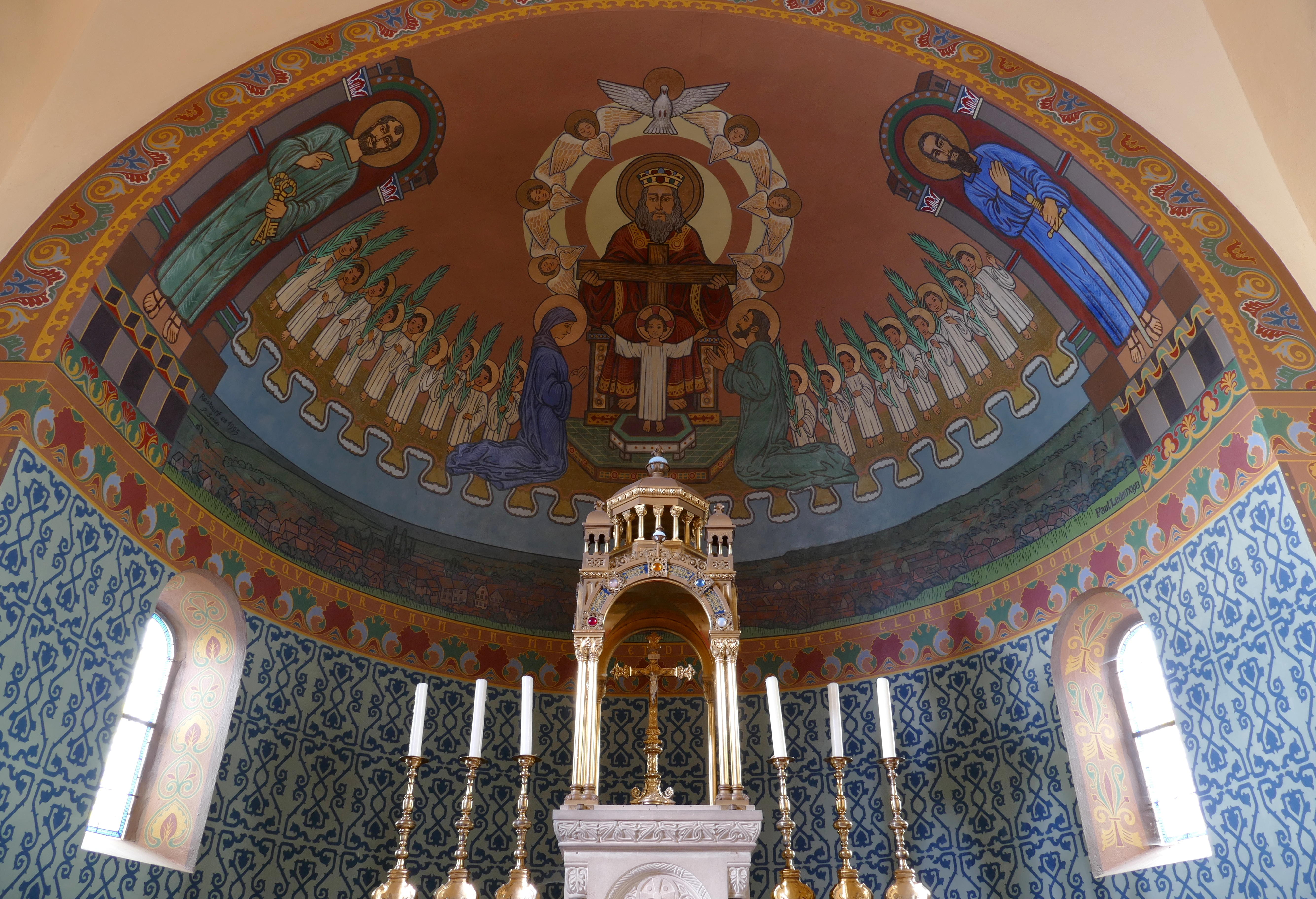 Alsace, Bas-Rhin, Église des Saints-Innocents de Blienschwiller (PA00084626, IA00115160). Fresque du chœur "Sainte-Trinité"; Fresque de Paul Ledoux (1884-1960): [1]